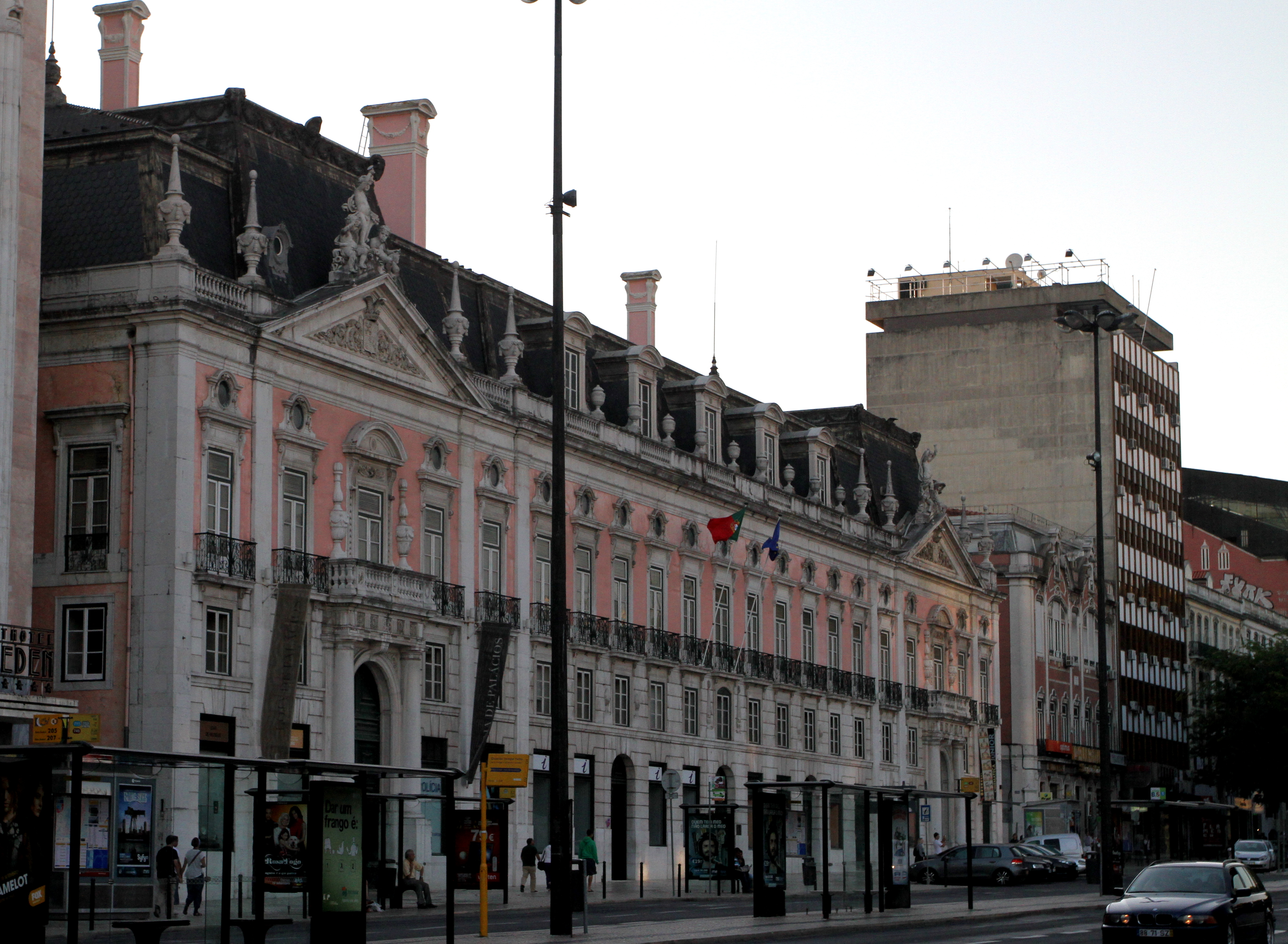 Palácio Foz - Lisboa